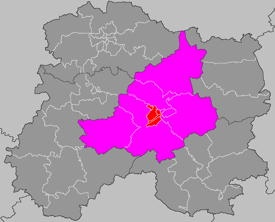 Localisation du canton de Châlons-en-Champagne-3